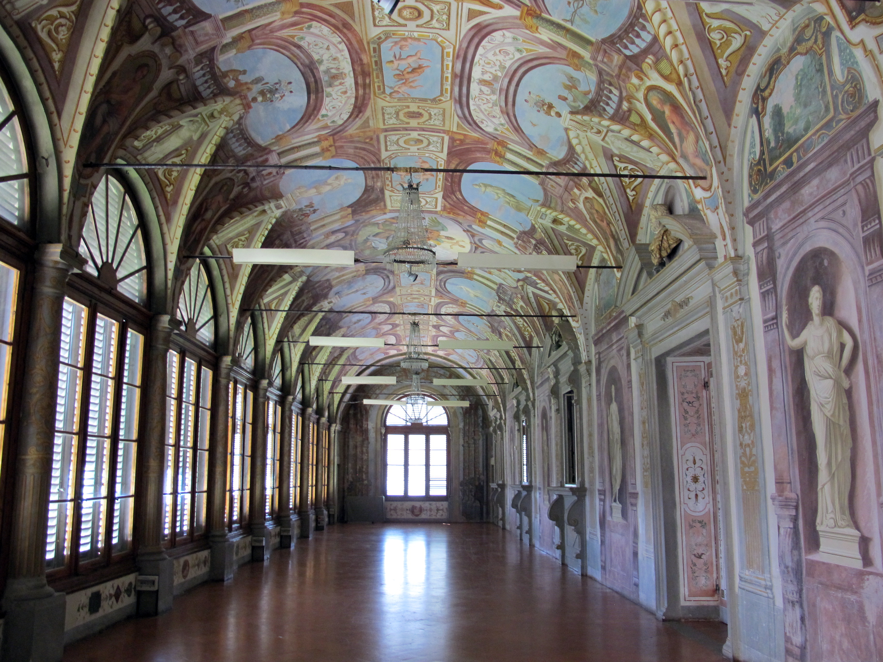 Villa Corsini (Mezzomonte)